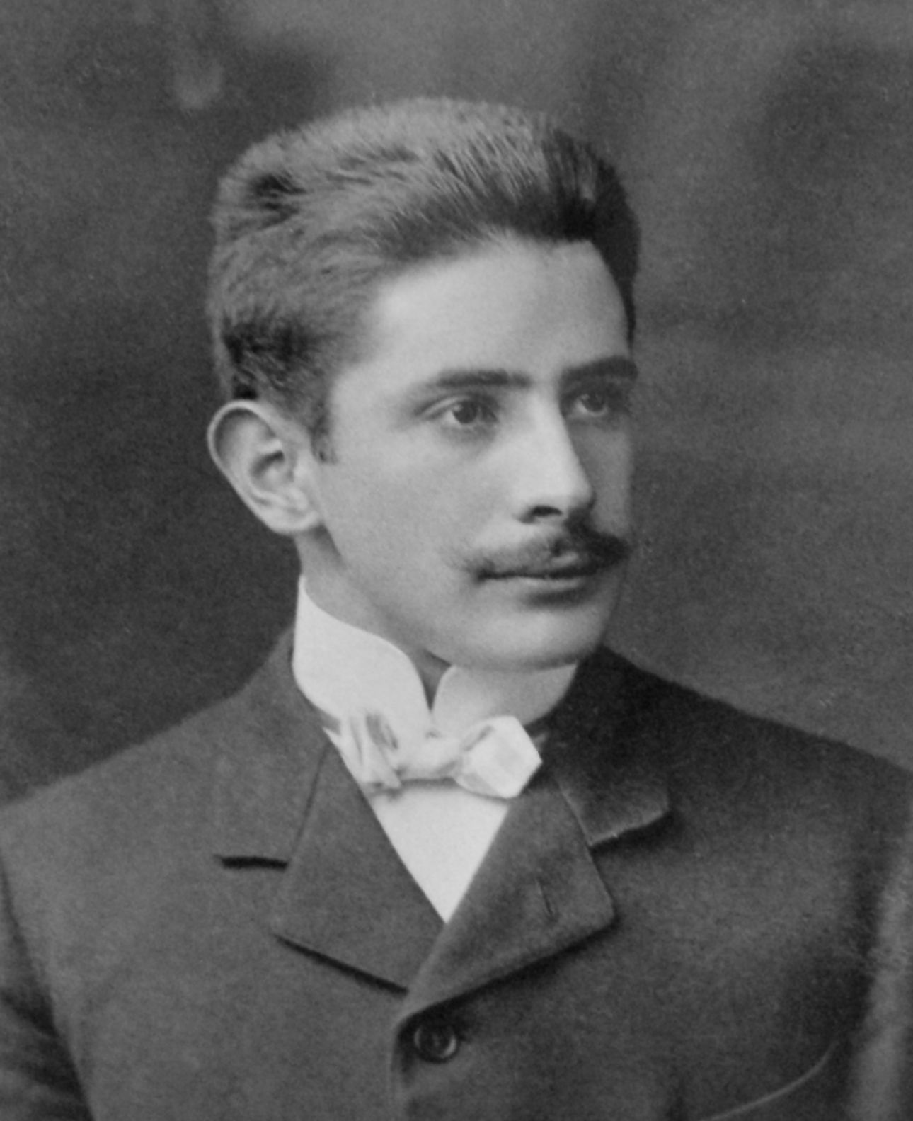 Franz Kruckenberg als Student im Jahr 1909.